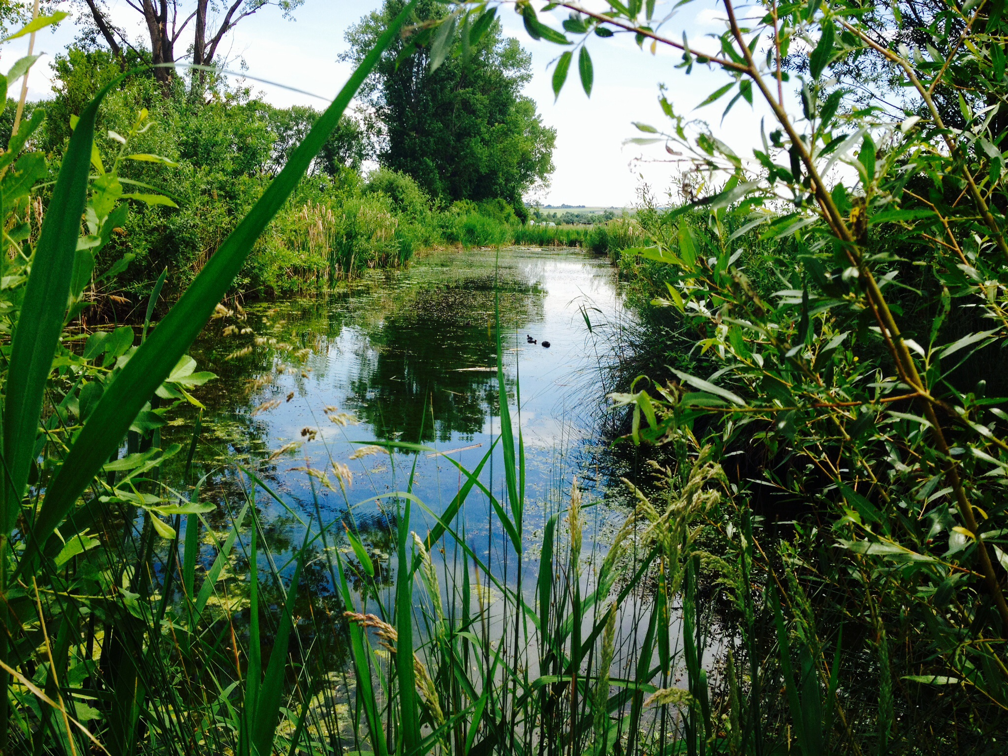 Naturschutzgebiet Reinheimer Teich Reinheim Odw.